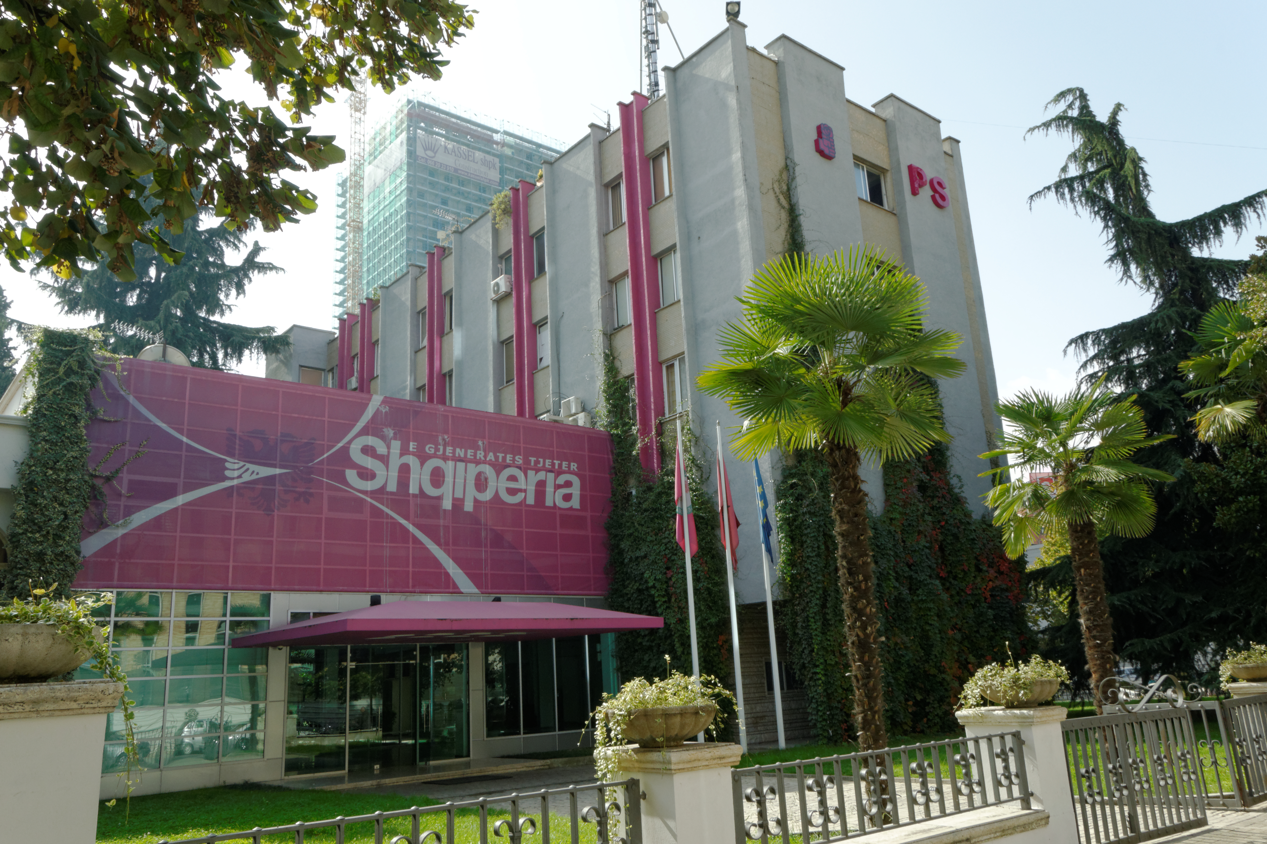 Selia e Partisë Socialiste, Tiranë. Sede del Partito Socialista. Sozialistischen Parteizentrale. Socialist Party headquarters. Foto: Dritan Mardodaj.